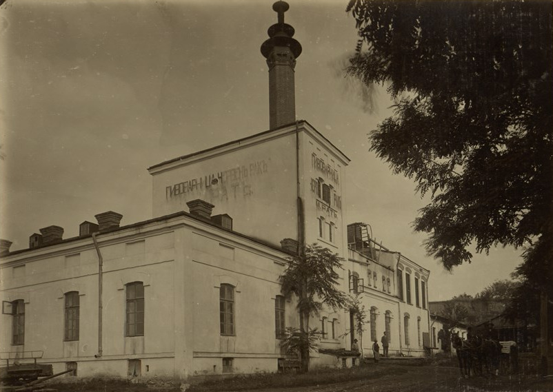 Пивоварна фабрика „Червен рак“ на М. Рат в Плевен. Фотоалбум с фотографии на български индустриални предприятия от периода 1887-1912 г., подарен от Съюза на българските индустриалци на цар Фердинанд І по случай 25-годишнината от възшествието му на българския престол.